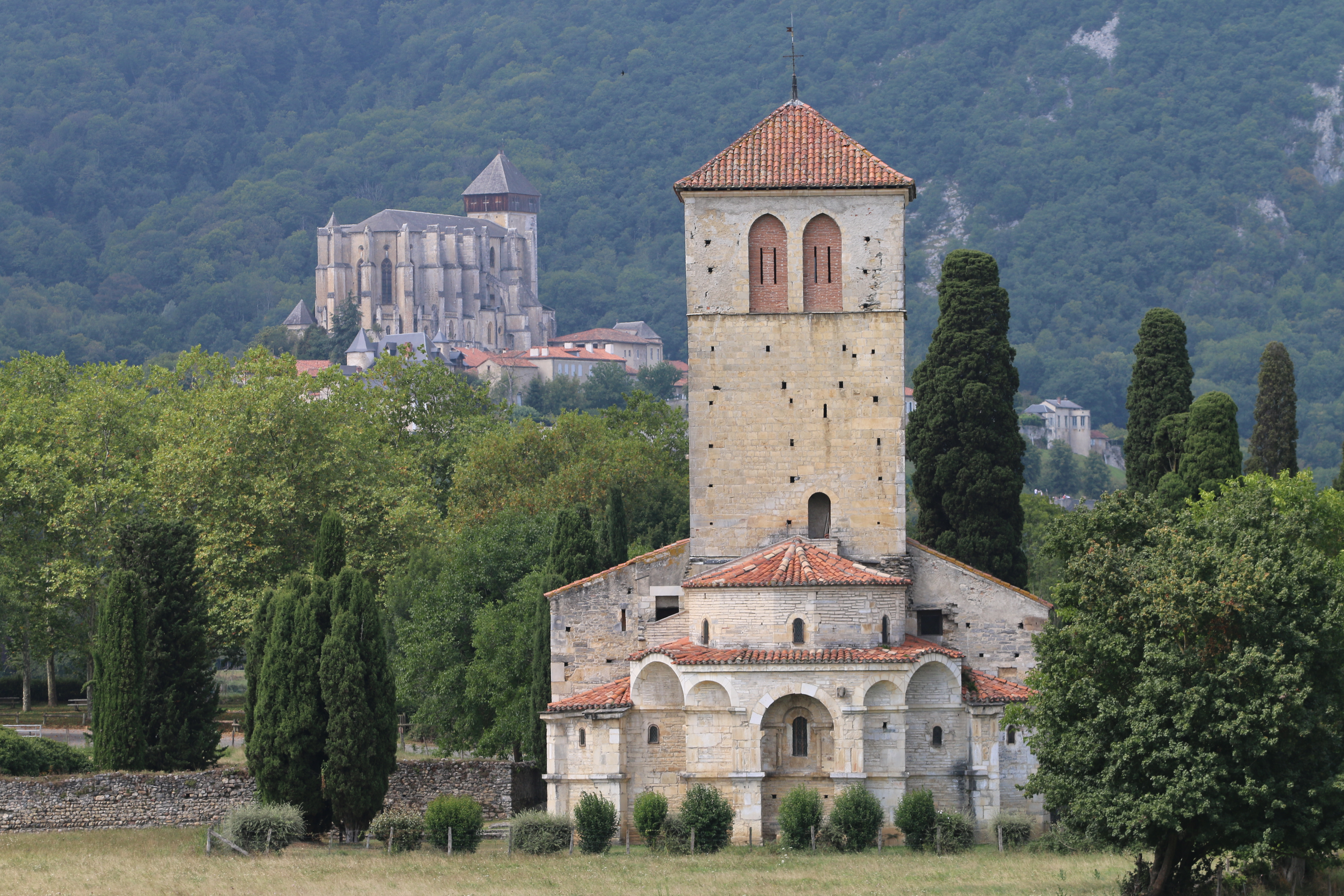 Basilique Saint-Just de Valcabrère .